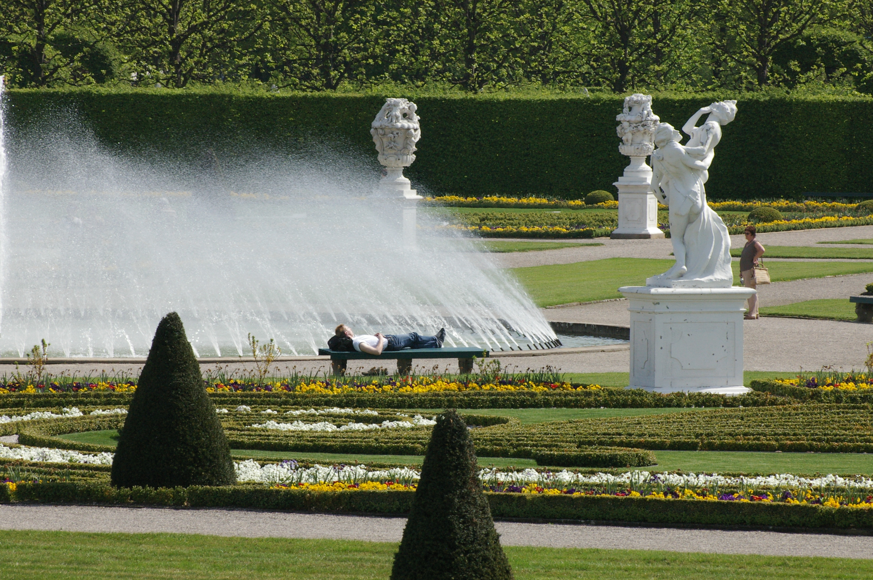 Hannover - Herrenhausen - Großer Garten - Glockenfontäne.